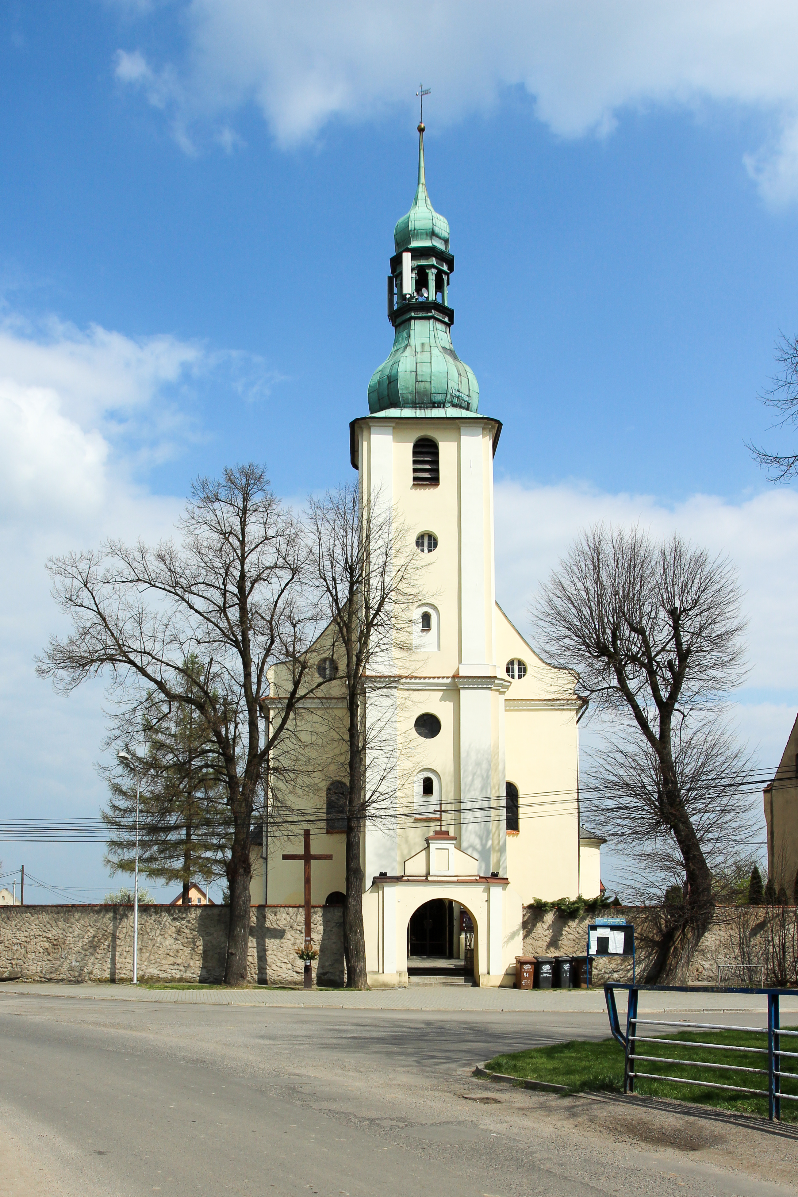 Mańkowice – wieś w Polsce położona w województwie opolskim, w powiecie nyskim, w gminie Łambinowice.